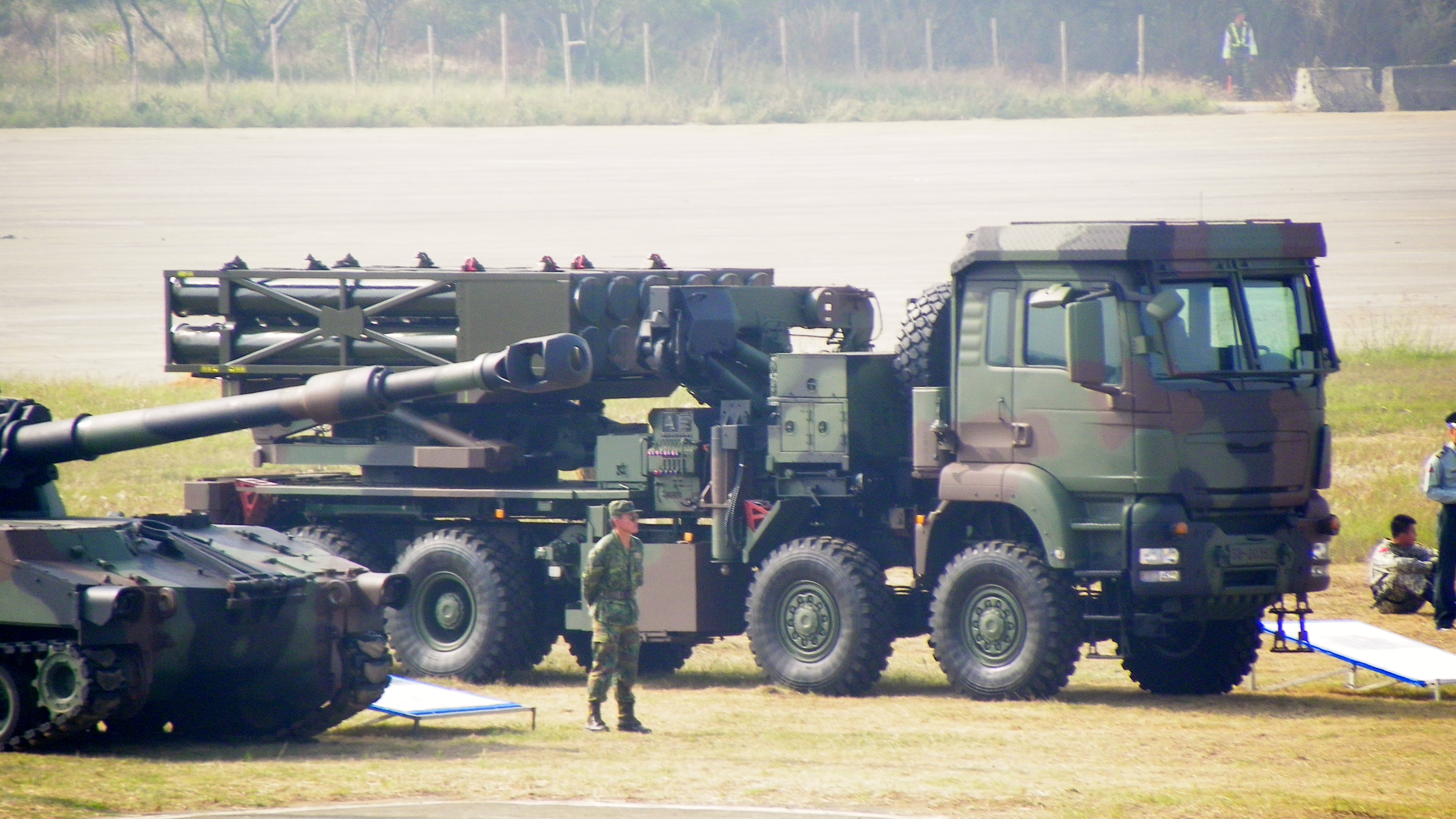 中華民國陸軍湖口營區開放日展出之雷霆2000多管火箭系統。